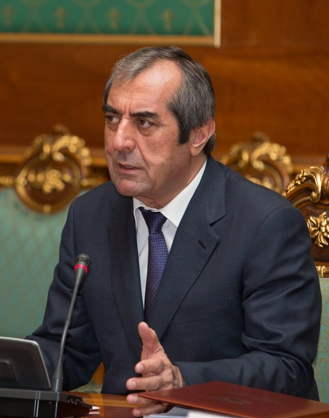 Махмадсаид Убайдуллоевич Убайдуллоев — советский и таджикистанский государственный деятель